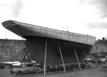 Robert Erskine Childers's Asgard Yacht